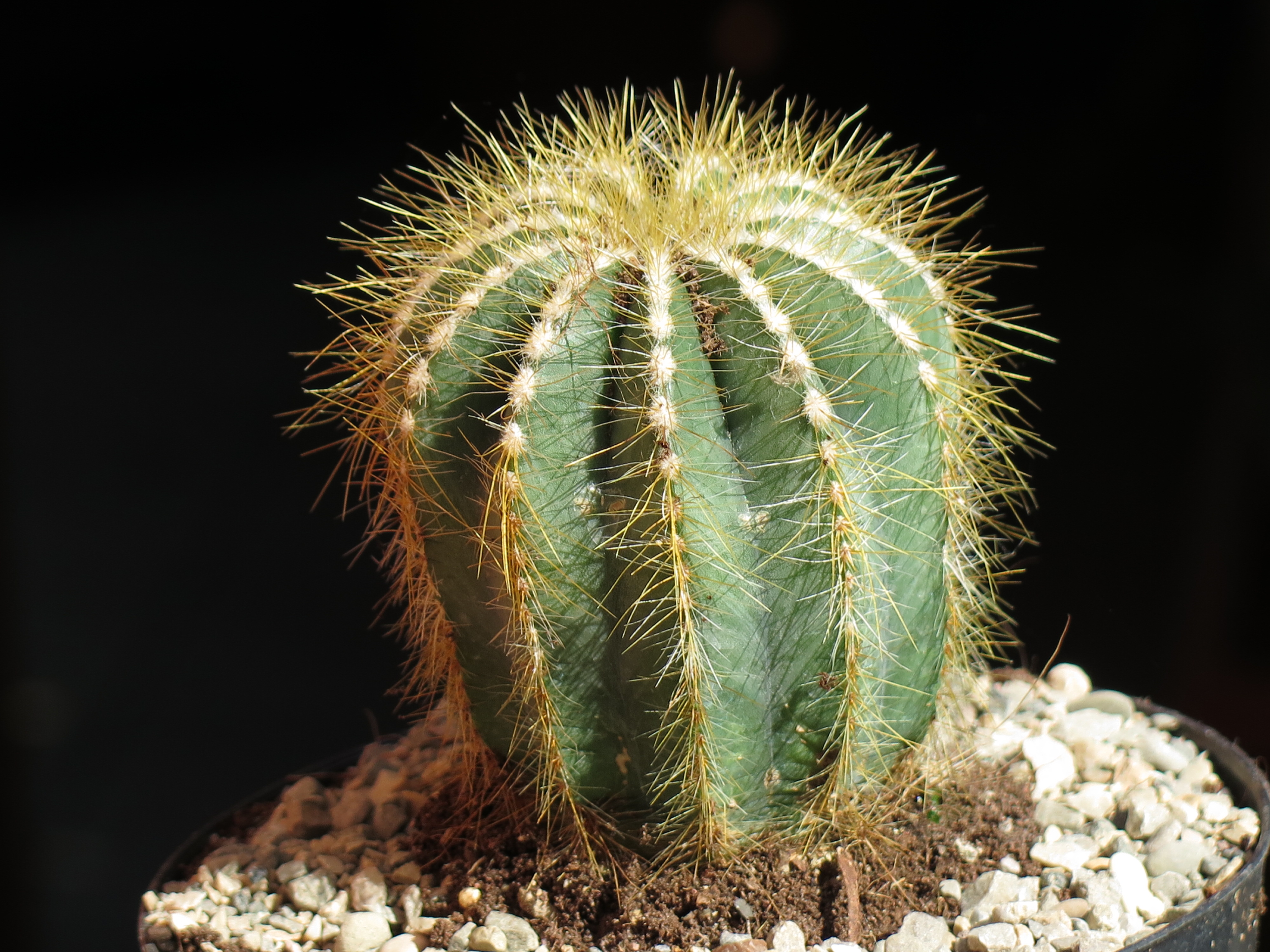 Una pianta di parodia warasii (notocactus warasii)